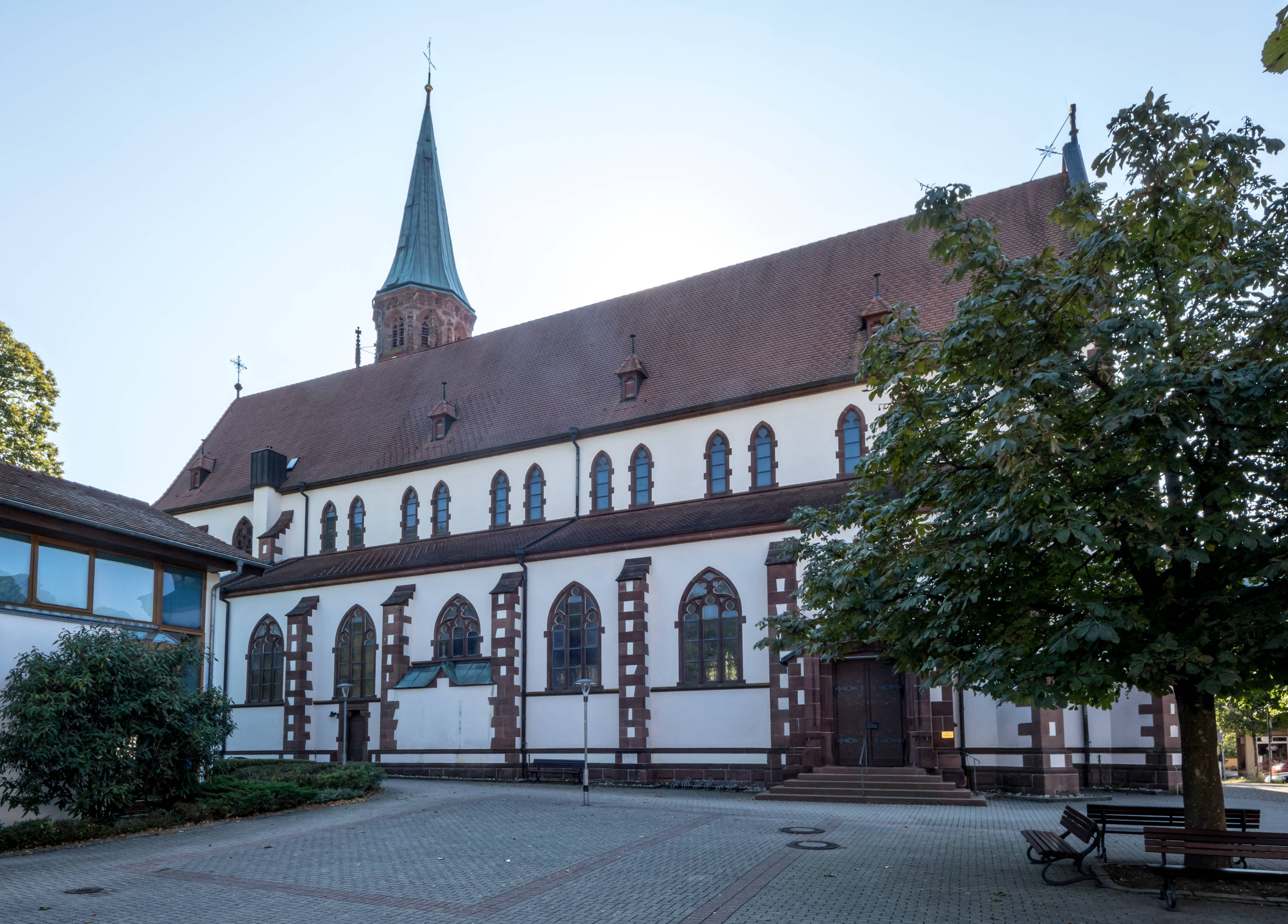 Die katholische Kirche St. Blasius im Glottertal